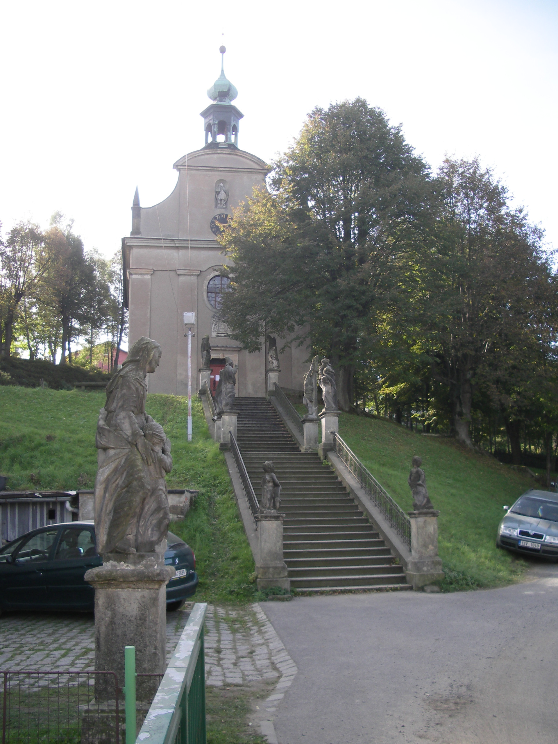 Ansicht der Zugangstreppe zur Wallfahrtskirche von der Brücke über den Wölmsdorfbach aus gesehen. Links und rechts stehen jeweils vier Treppenfiguren. Es sind dies linksseitig von unten ab: ein Engel mit Schild, der Heilige Adalbert, der Heilige Wenzel und der Heilige Johannes Nepomuk. Rechtsseitig stehen ebenfalls von unten ab gesehen: ein Engel mit Schild, die Heilige Rosalia, der Heilige Sebastian und der Heilige Rochus. Am linken Bildrand ist eine der beiden Brückenfiguren zu sehen. Es handelt sich dabei um die Heilige Anna.